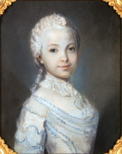 Portret Izabeli z Czartoryskich Lubomirskiej